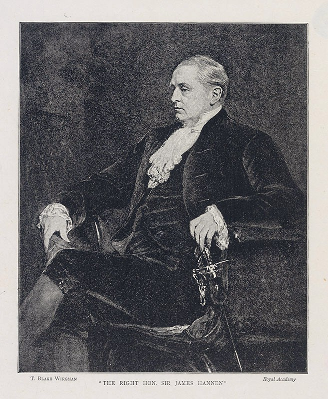 Portrait of James Hannen, Baron Hannen (1821-1894)